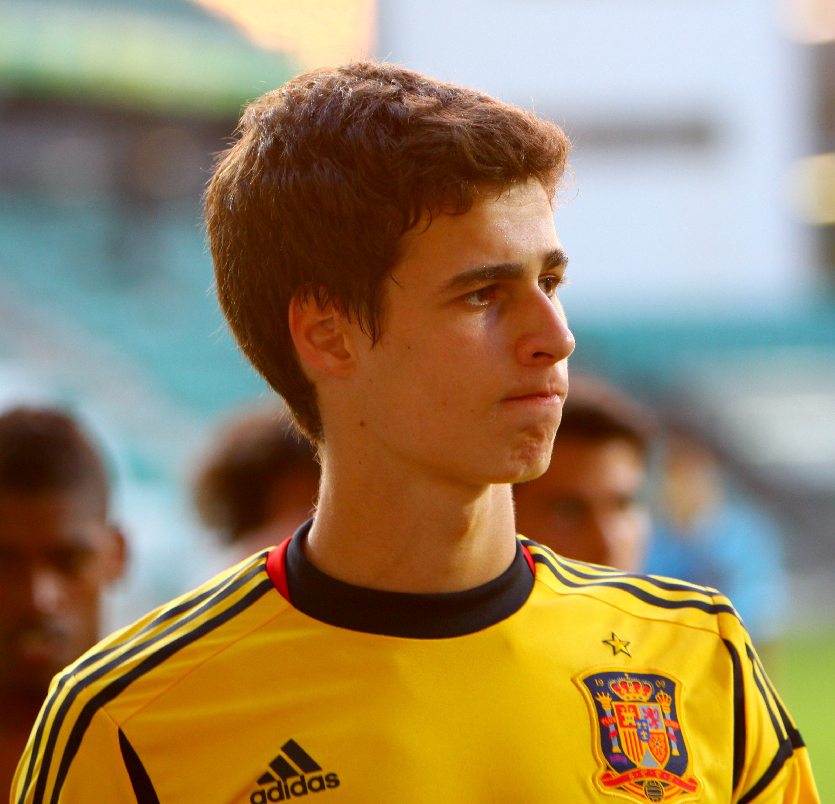 U-19 Portugal vs Spain.